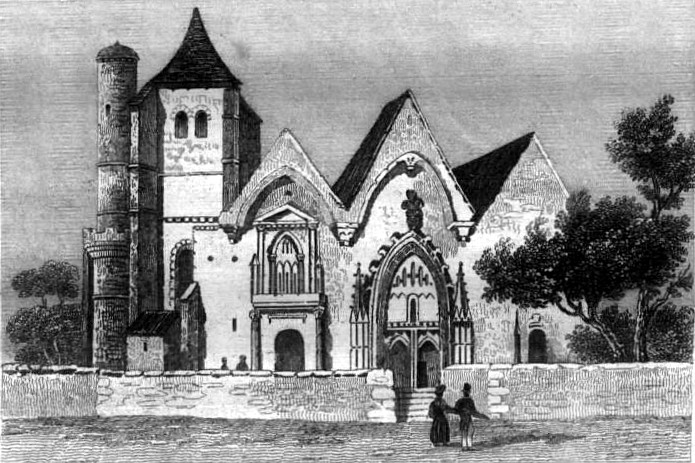 « Eglise du Pont-Sainte-Marie » Image en provenance du livre : Eusèbe Girault de Saint-Fargeau, Guide pittoresque du voyageur en France, contenant la statistique et la description complète des quatre-vingt-six départements, orné de 740 vignettes et portraits gravés sur acier, de quatre-vingt-six cartes de départements et d'une grande carte routière de la France, par une Société de gens de lettres, de géographes et d'artistes, Paris, F. Didot frères, 1838, 6 volumes in-8° (BNF : 8-L25- 46). Volume III Route de Paris à Nice traversant les départements de l'Isère, des Hautes-Alpes, des Basses-Alpes et du Var. auteurs dessins : Rauch (ou autre) auteurs gravures : Skelton fils, Schroeder, Bishop (ou autre)